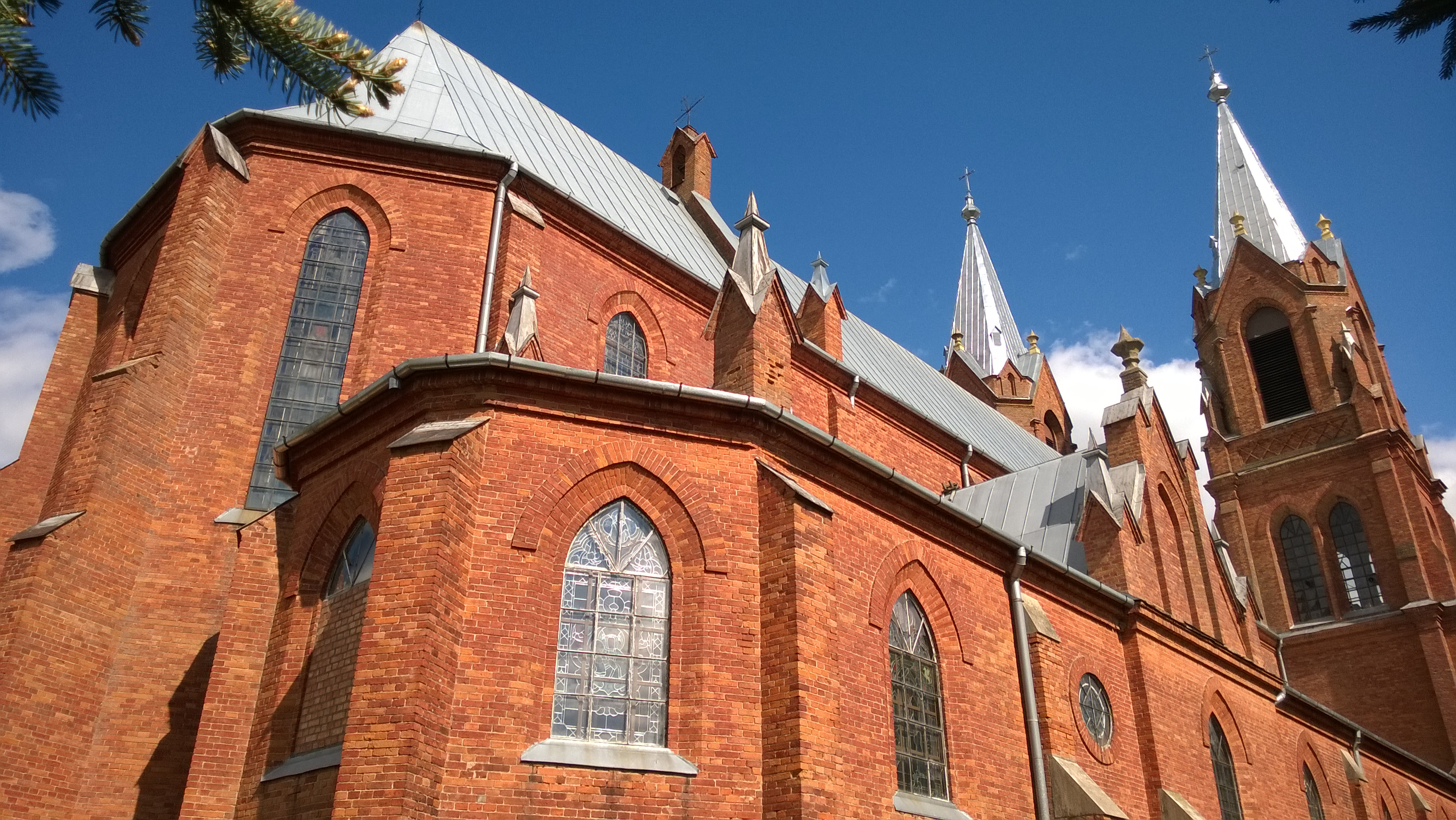 Staryya Vasilishki, Belarus